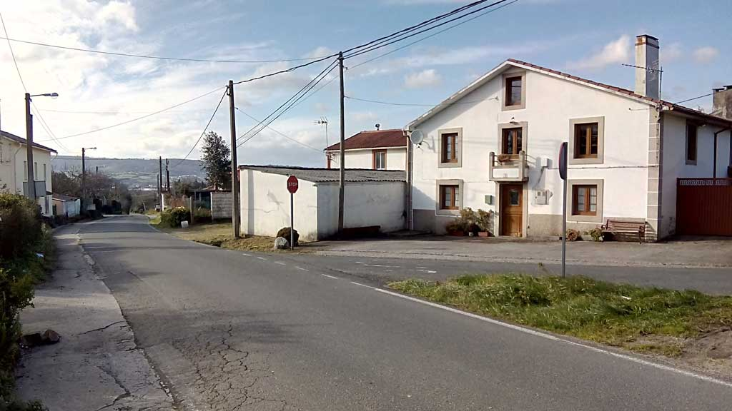 Vista da Borrallada, Castro, Narón.